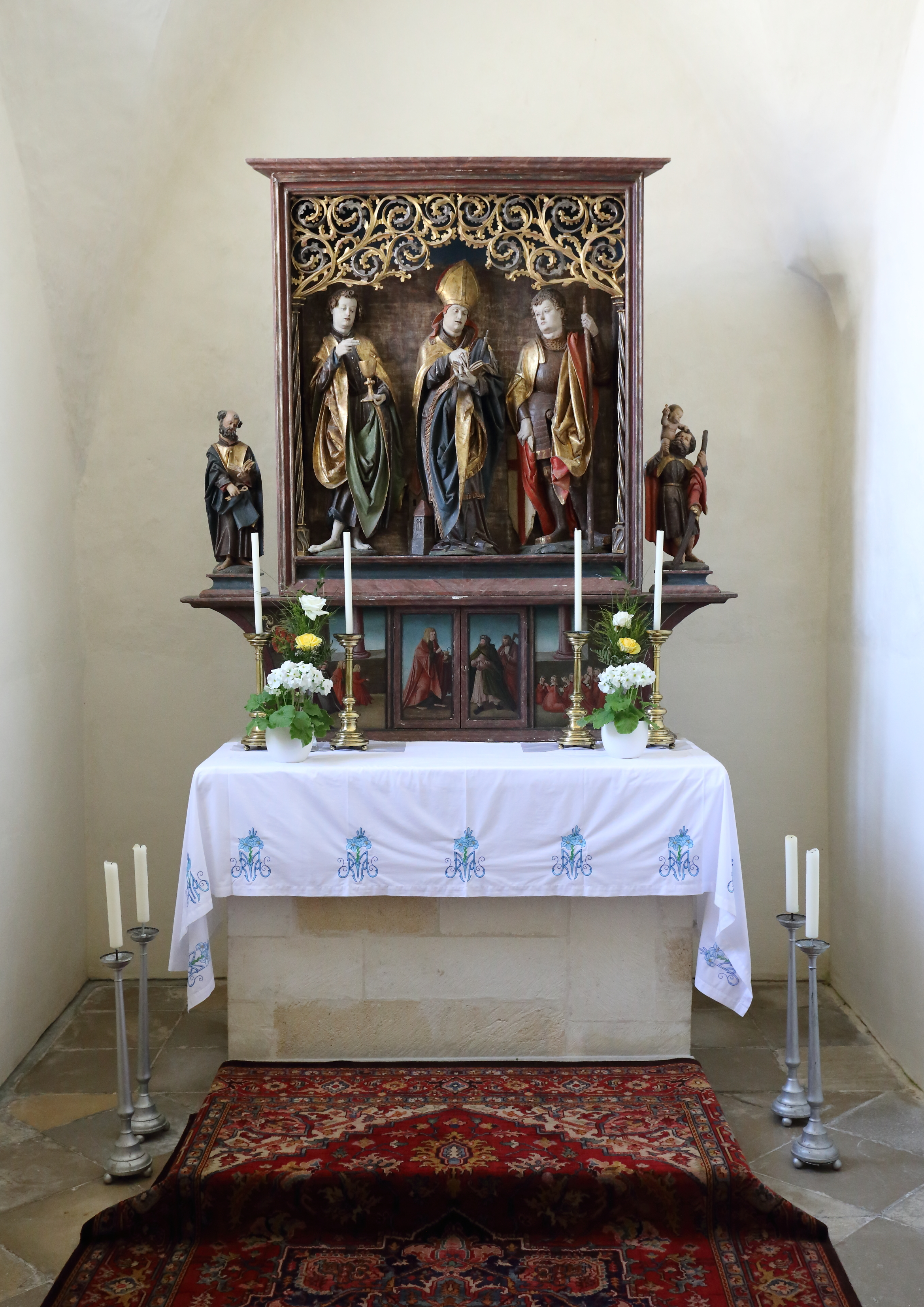 Altar der linken Seitenkapelle der katholischen Pfarrkirche Mariae Himmelfahrt in Neukirchen am Ostrong, ein Ortsteil der niederösterreichischen Marktgemeinde Pöggstall.